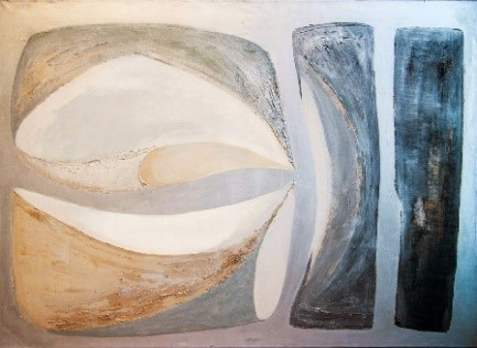 ELMÚLÁS (100x140 cm, olaj, vászon) A viszonylagos zárt forma mintegy zsugorodó, szívóhatással visszaalakul az élettelenbe. Ez az élettelen forma azonban már nem rejti az élet további lehetőségét.